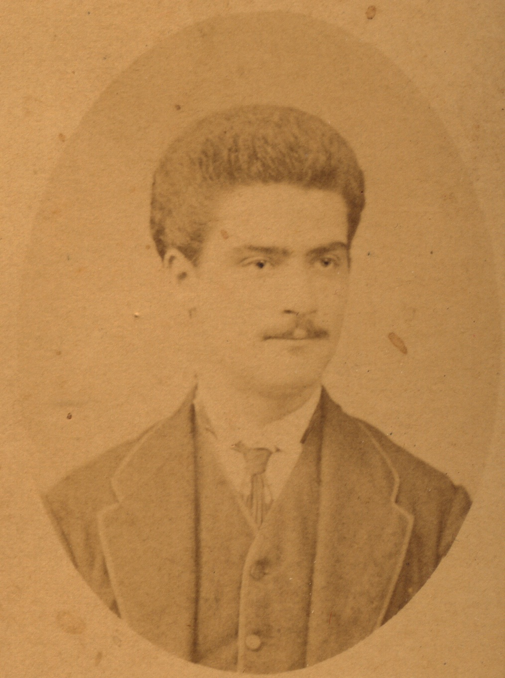 Torquato Castellani, Italian ceramist